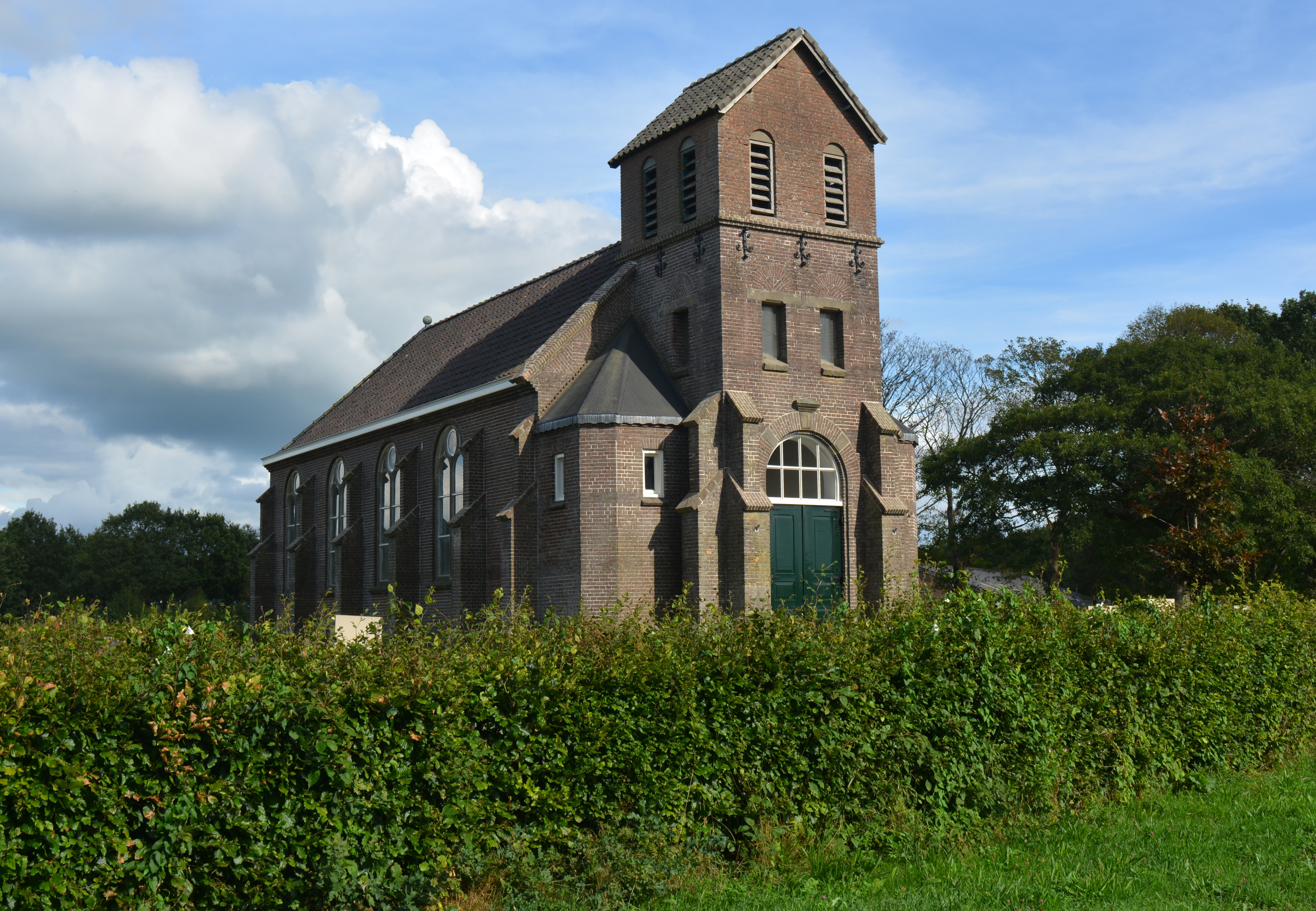 Finkegea, tsjerke